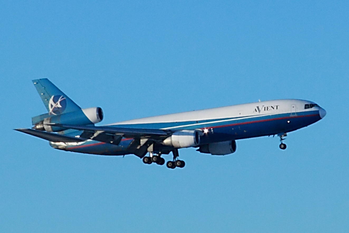 Avient Aviation DC-10